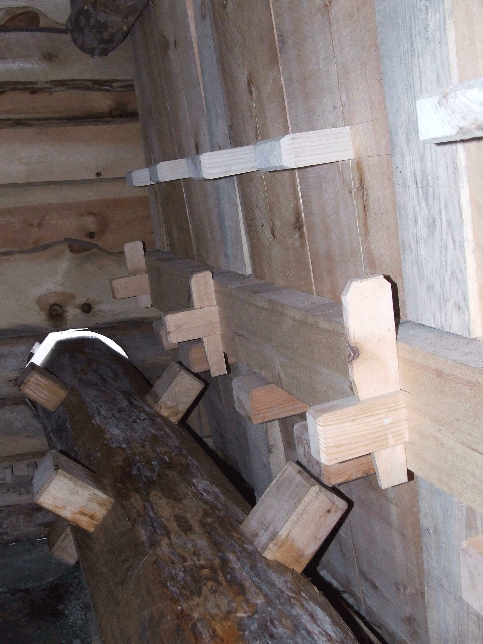 Drivhjul til tøystampe